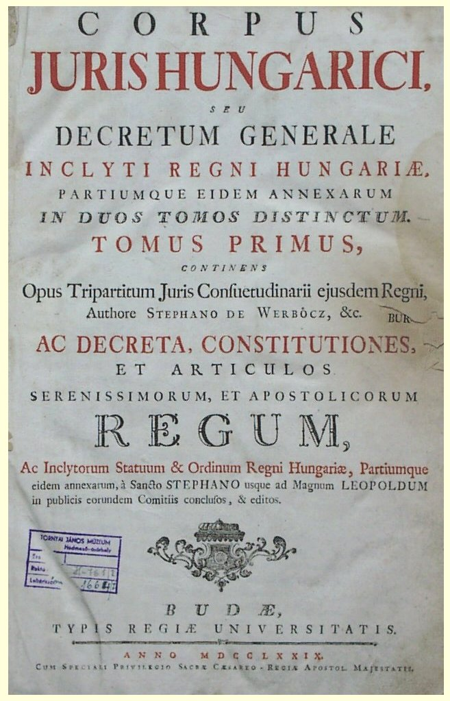 Magyar törvénytár